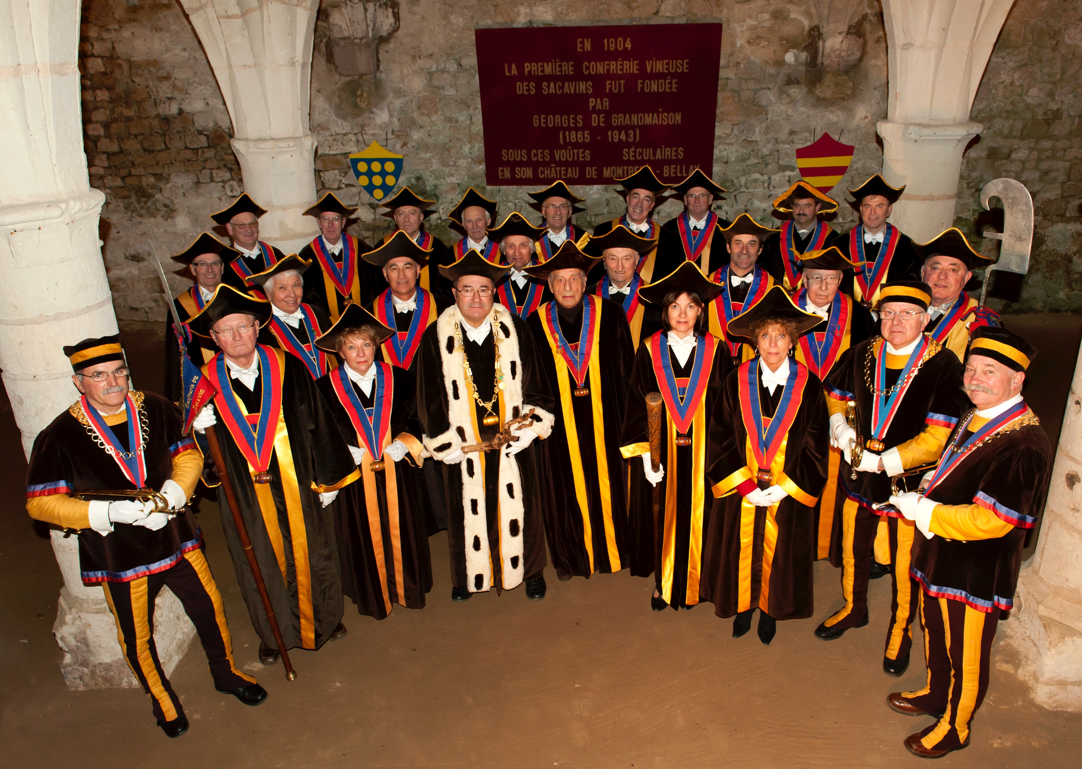 Photo prise dans les caves du Château de Montreuil Bellay